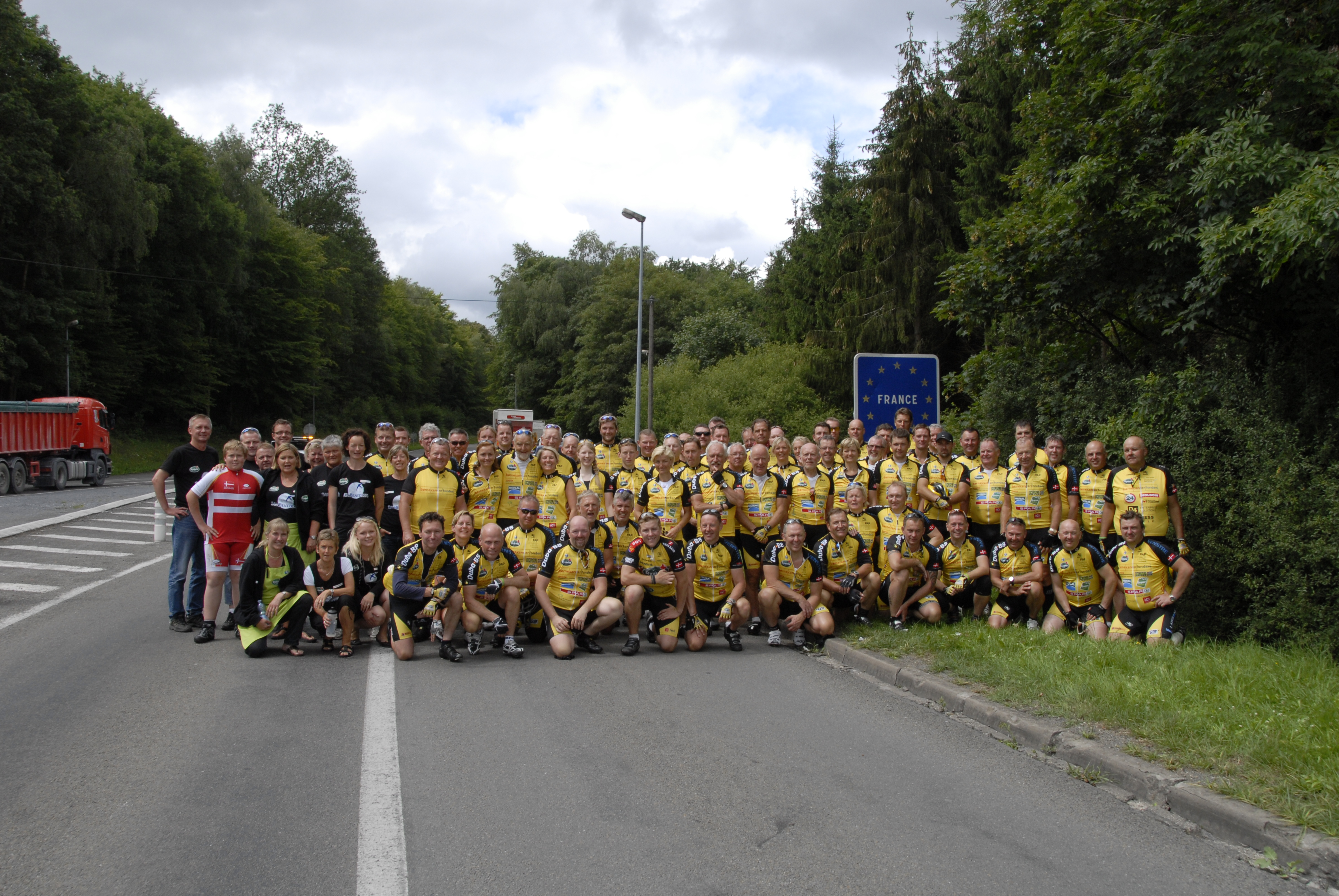 Team Rynkeby Ringe 2011 er nået til Frankrig